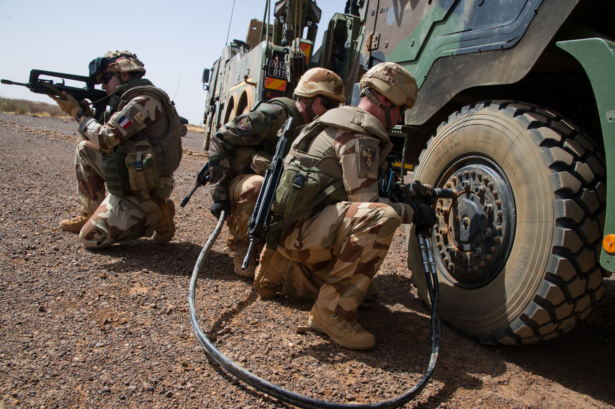 6e régiment du matériel durant l'opération Barkhane en 2017.